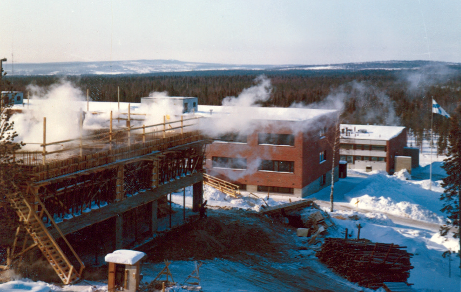 Kasarmi 2 nousee Someroharjun rinteeseen.